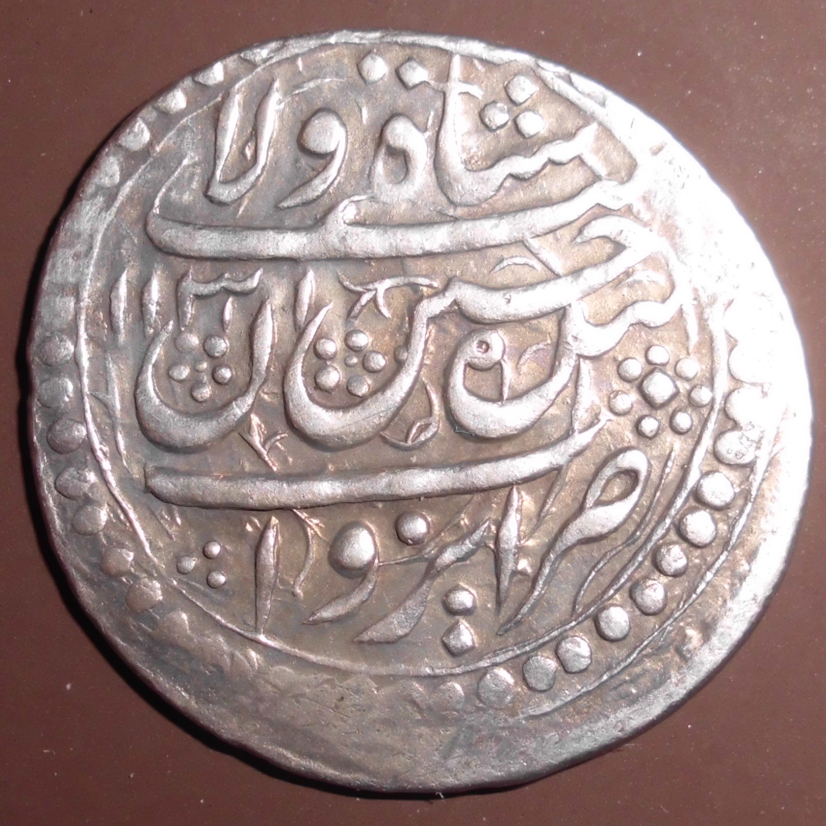 Султан Хусейн I, аббаси, тип D - третий стандарт, вес 5,4 г, Ереван, 1131 год хиджры. Аверс